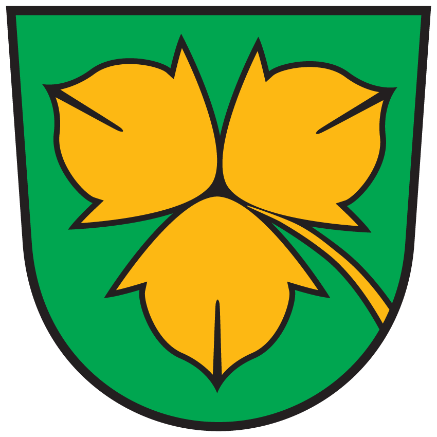 Wappen von Köttmannsdorf